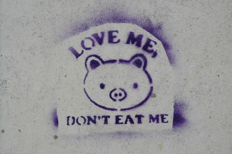 Pochoir en faveur du végétarisme, dans les rues du Mans.